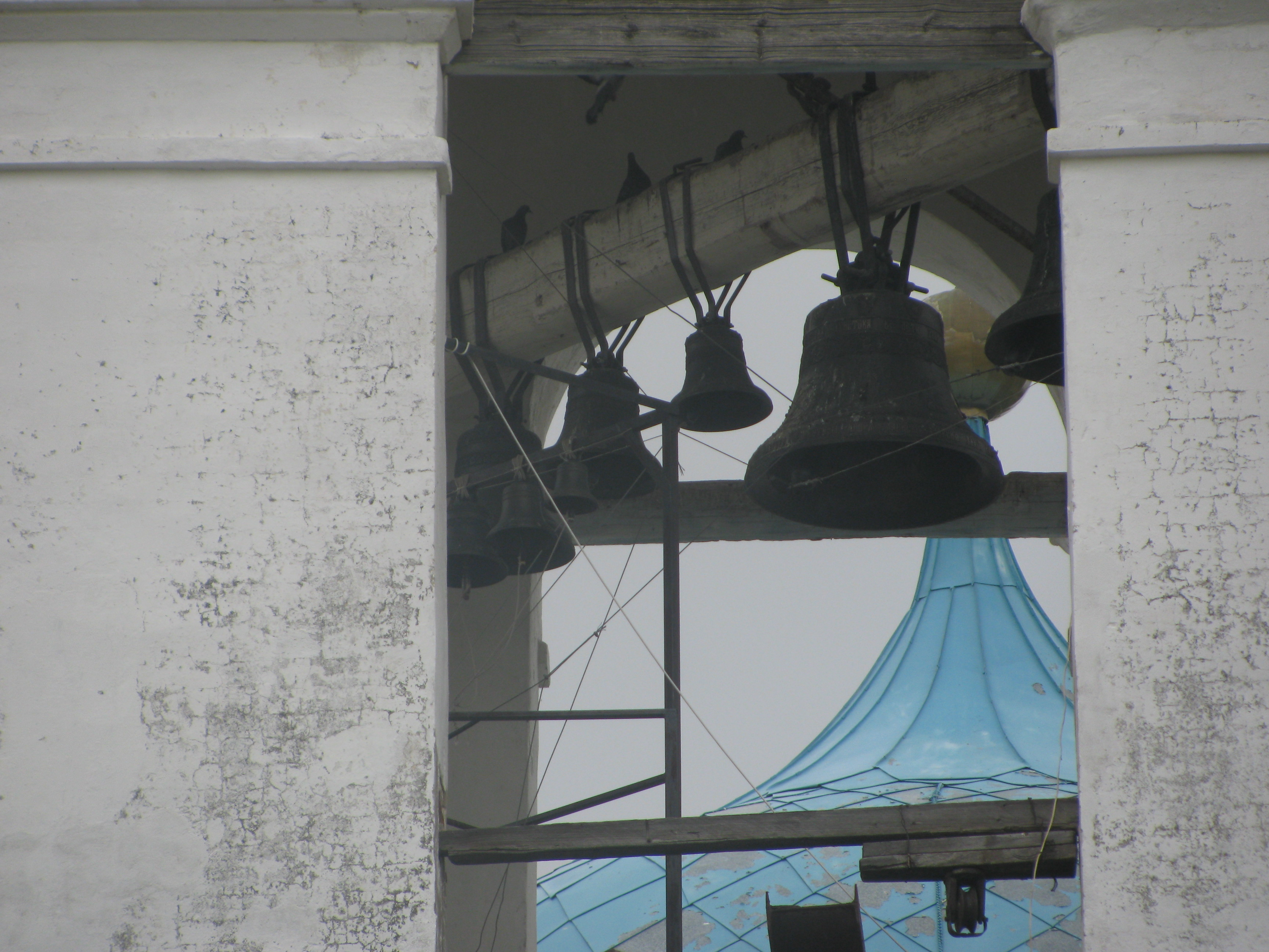 Колокола храма Рождества Христова в Нижней Добринке